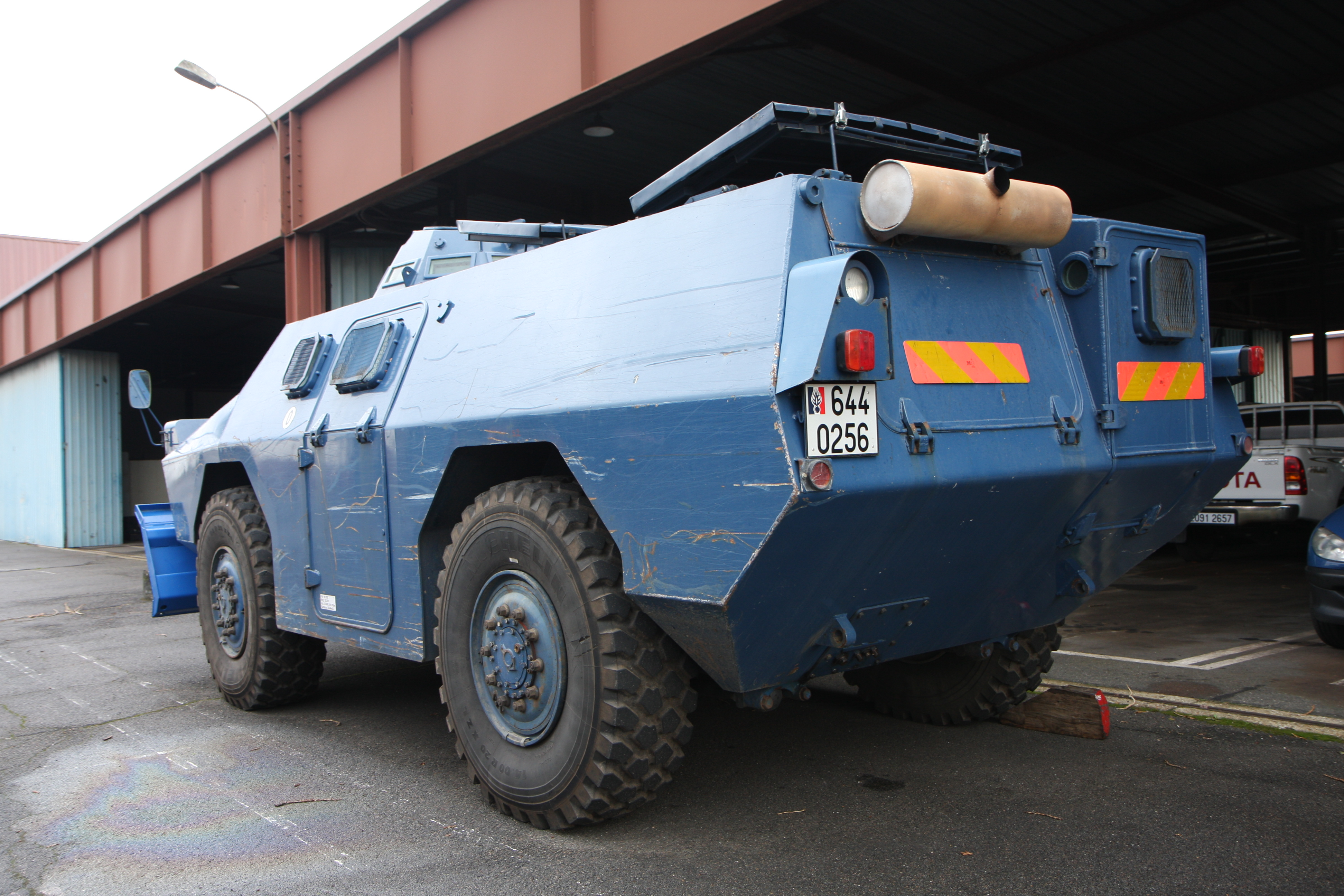 VBRG "lame" vue arrière